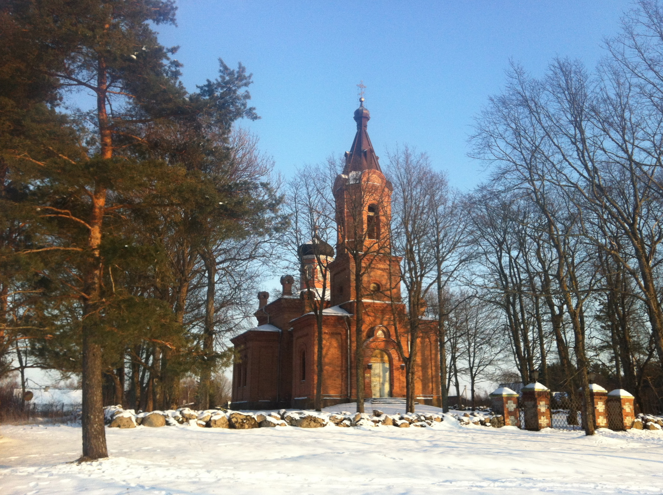 Tahkuranna õigeusu kirik